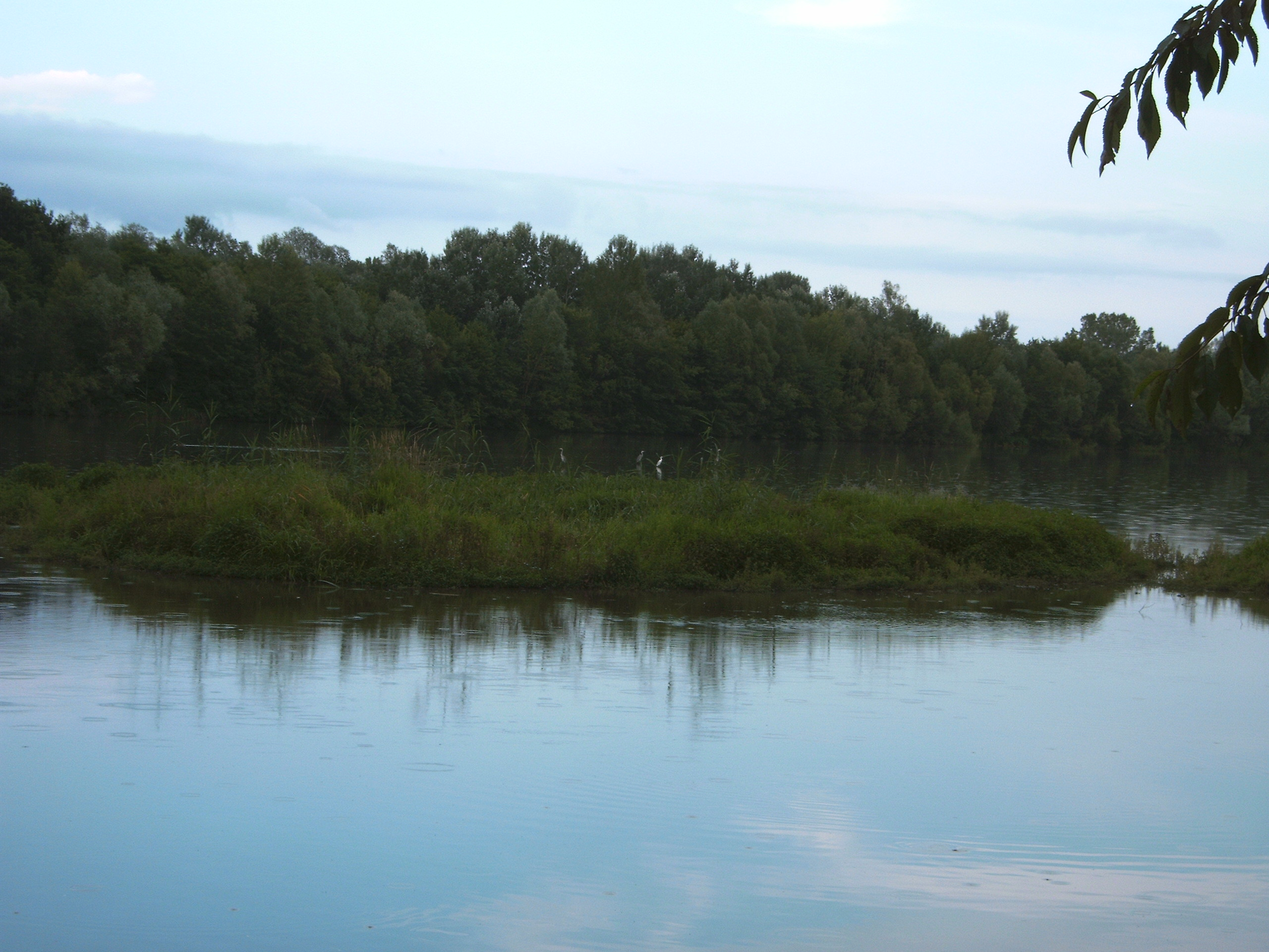 Graureiher und ein Silberreiher im Stauraum vor dem Flusskraftwerk Gralla